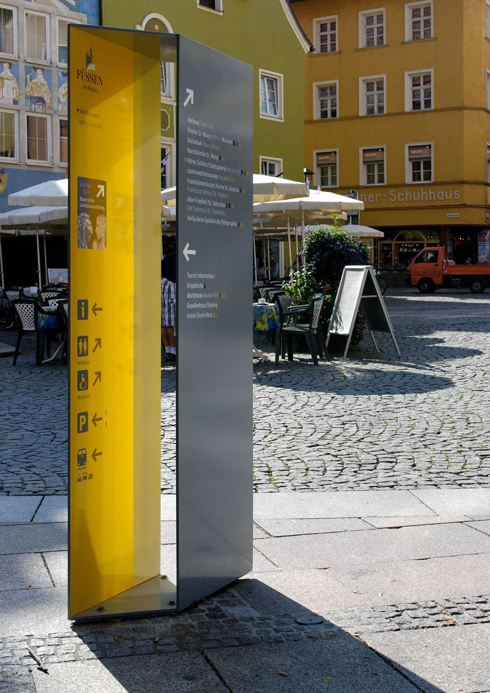 Fußgänger-Leitsystem für die Stadt Füssen, Konzeption design-gruppe koop